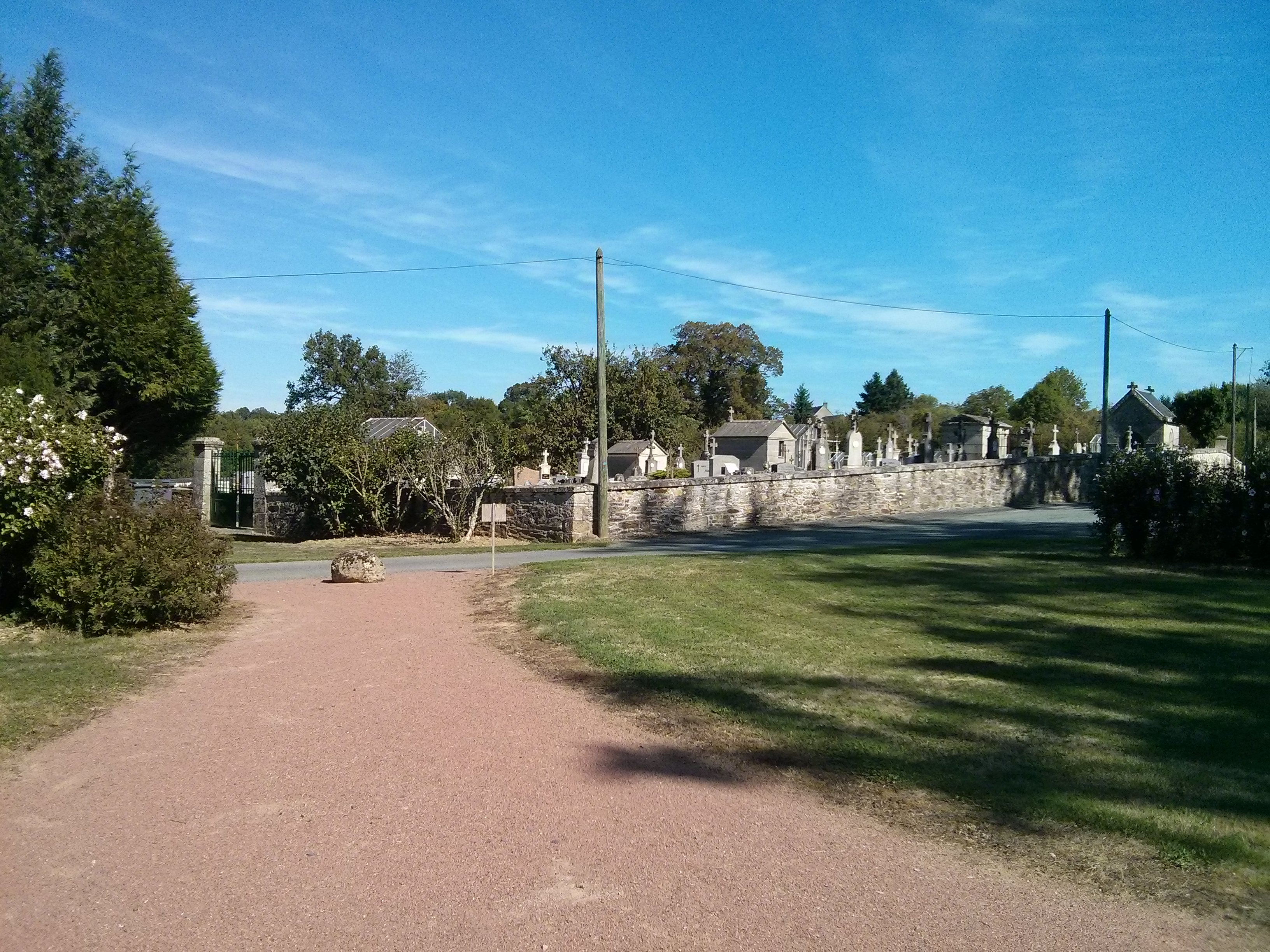 Vue depuis l'extérieur du cimetière de la Forêt-du-Temple, Creuse, Limousin, France.